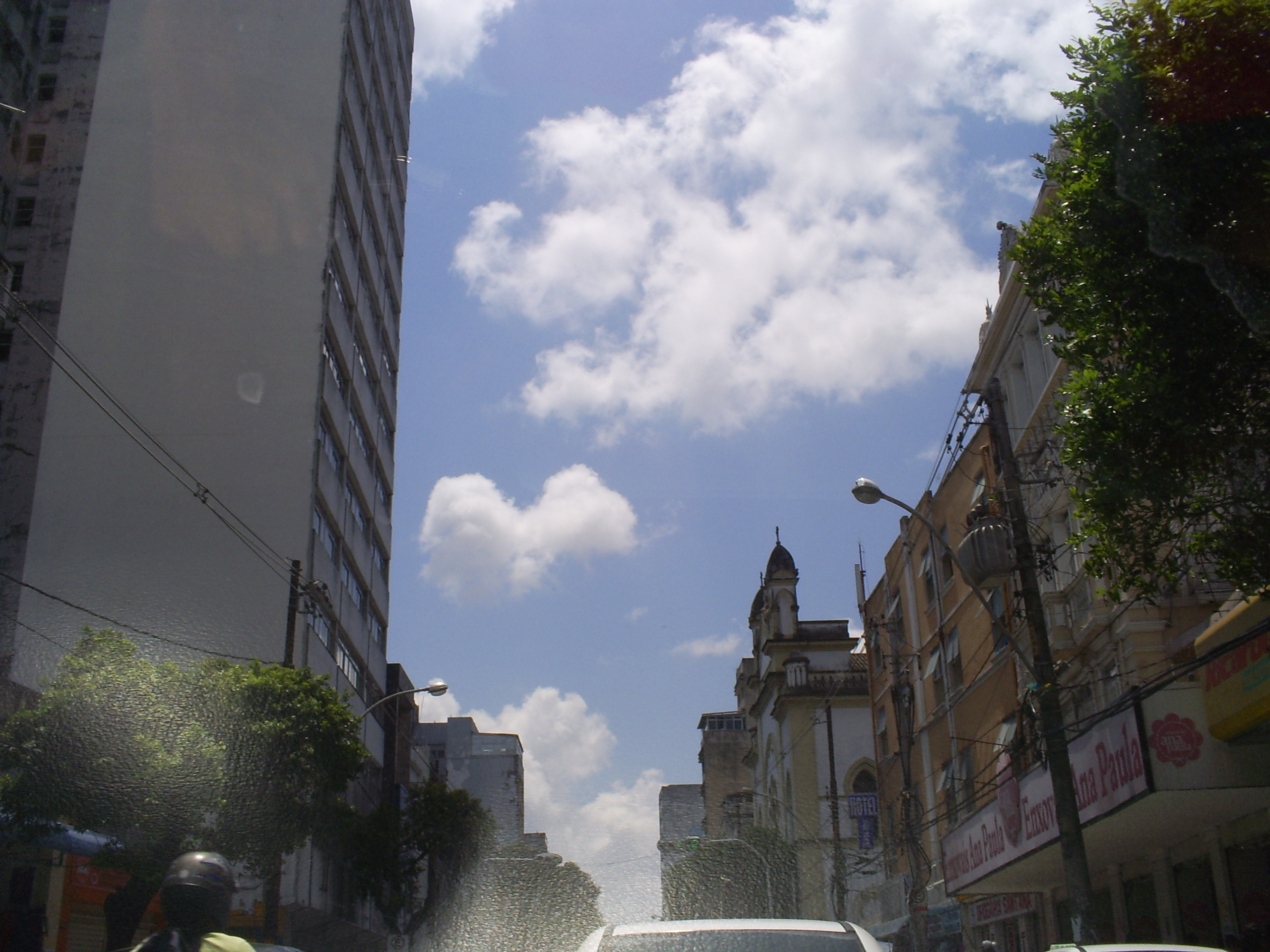 Foto da Avenida Sete de Setembro, Salvador, Bahia, Brasil.